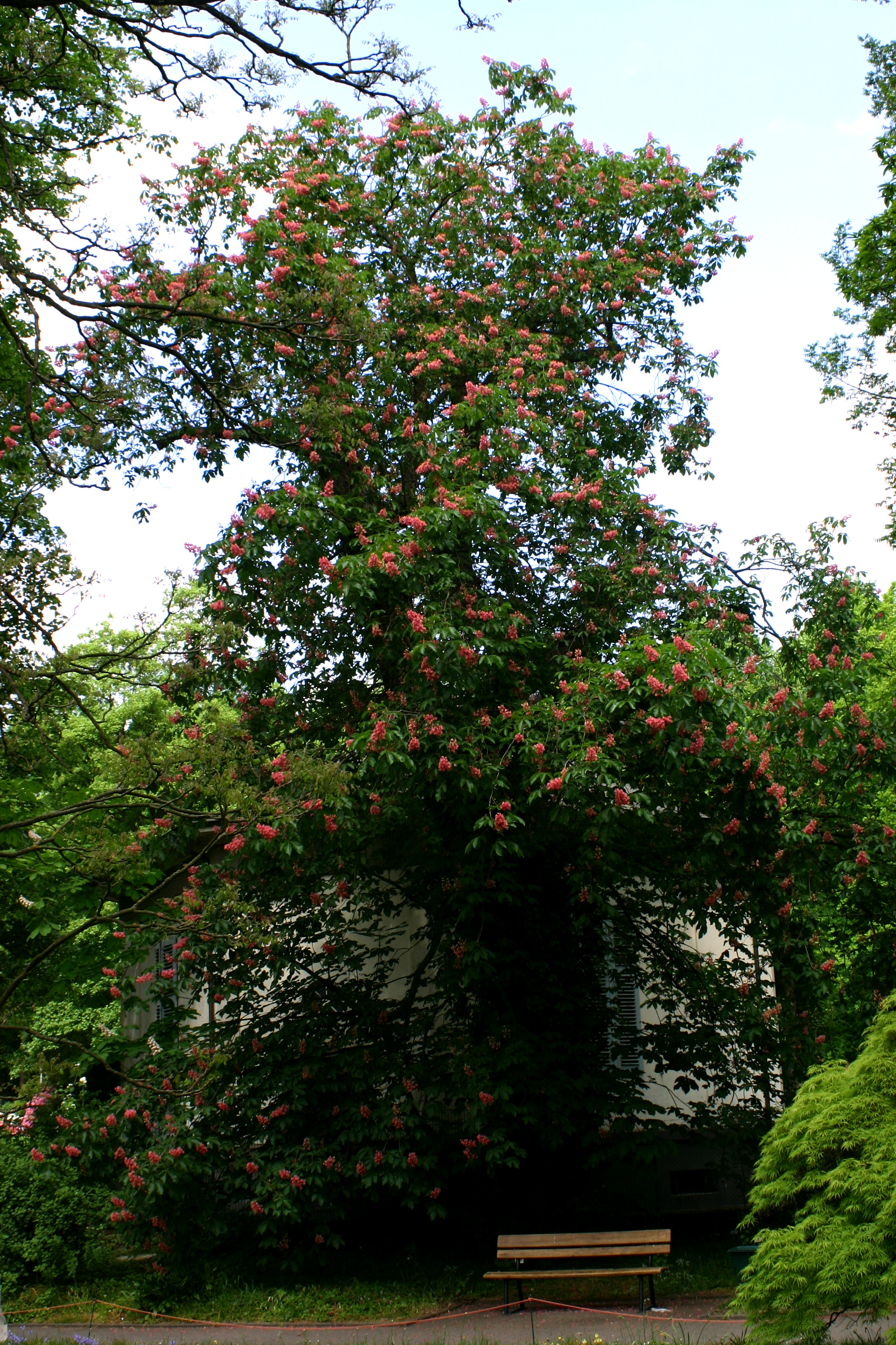 Purpurkastanie im Botanischen Garten der Westfälischen Wilhelms-Universität Münster (Aesculus carnea)